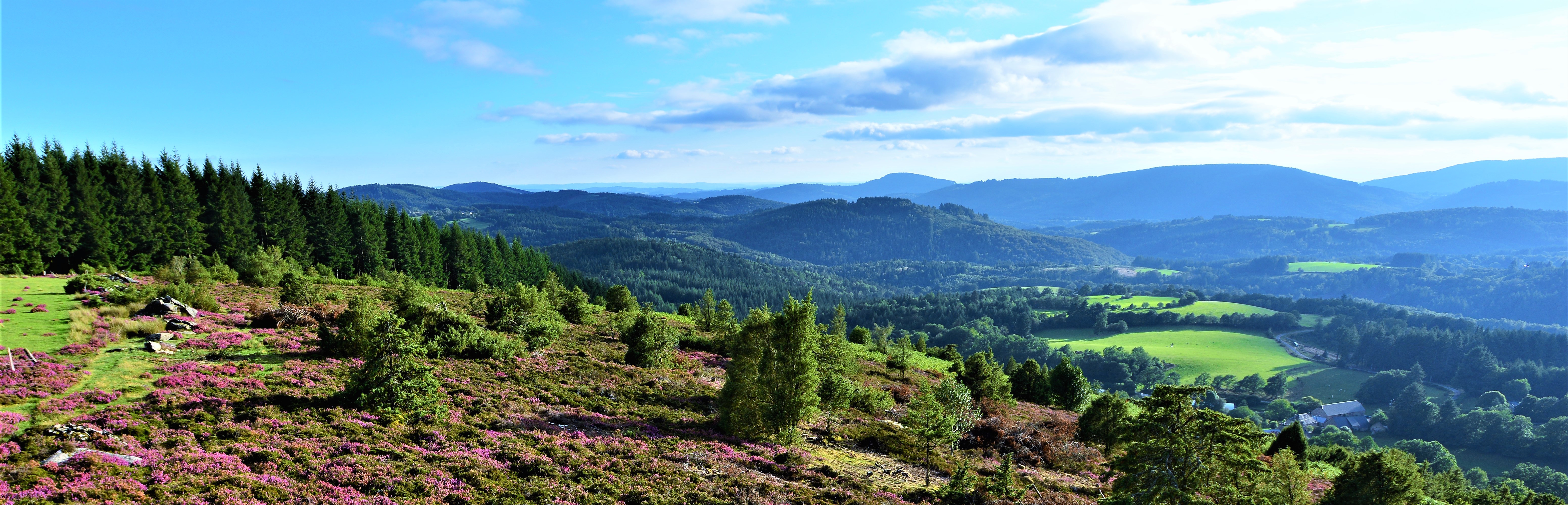 Panorama depuis le puy de viossanges. Ici finit le plateau de Millevaches et débute le massif des Monédières. En bas à droite de l'image se trouve le hameau de Viossanges et au centre gauche on distingue au loin le bourg de Saint Yrieix-le-déjalat.